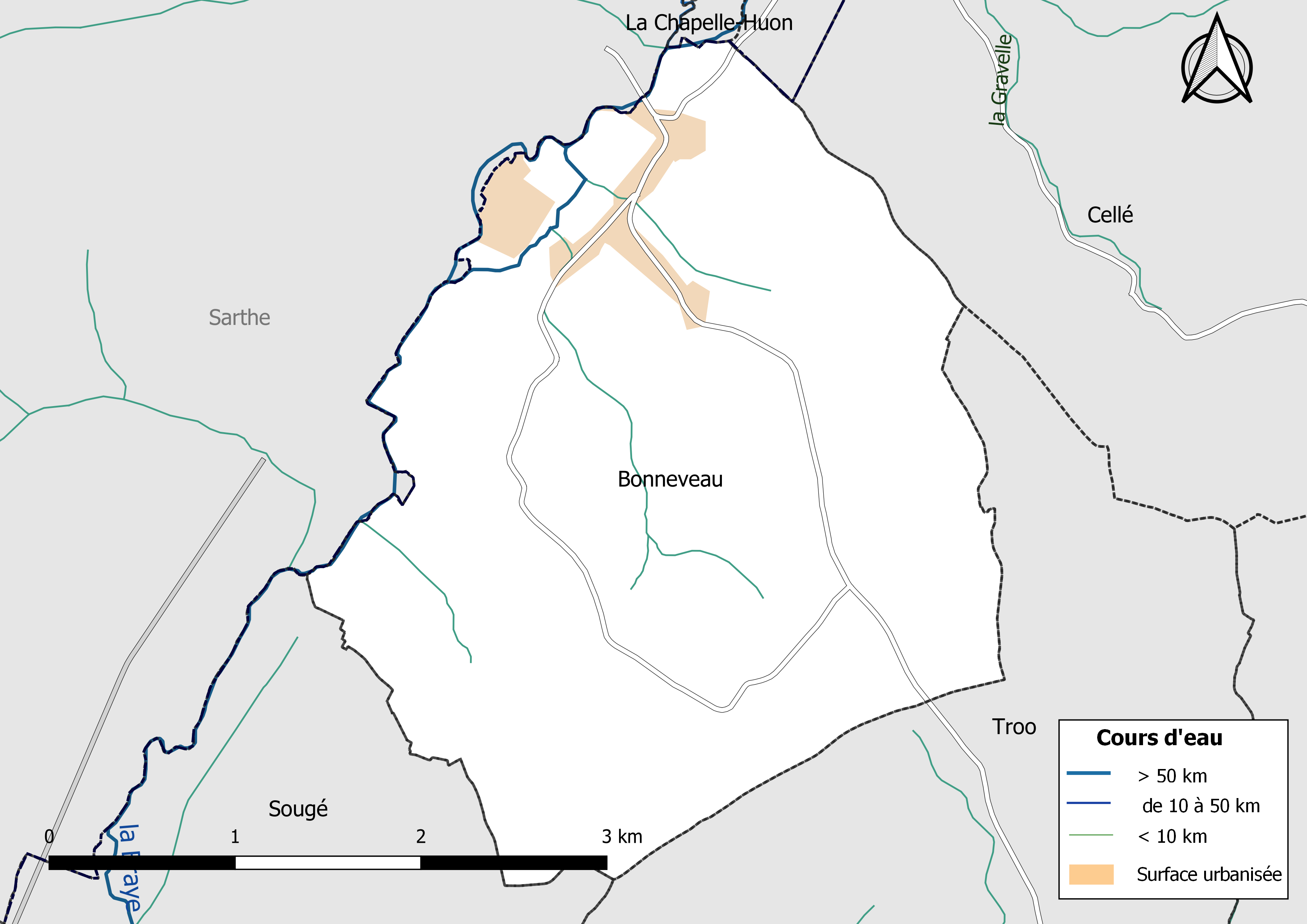 Carte du réseau hydrographique de la commune de Bonneveau (France).